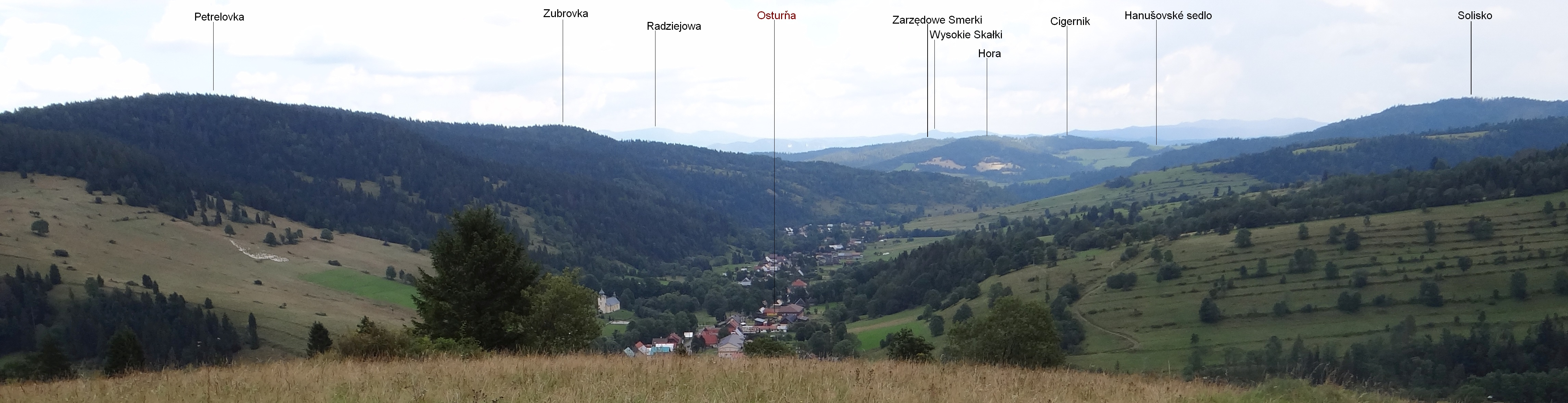 Osturnianska brazdá